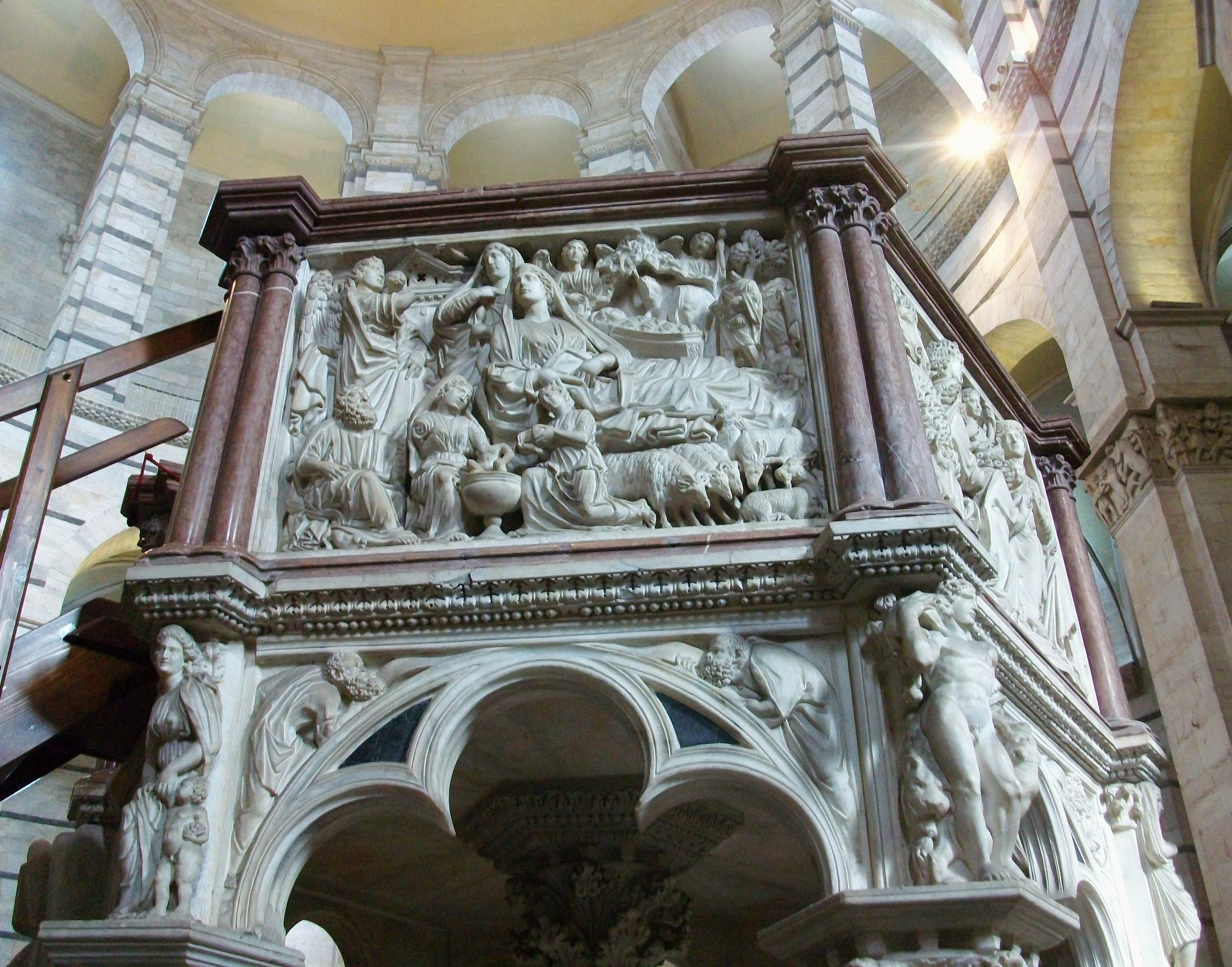 Púlpit del baptisteri de Pisa.